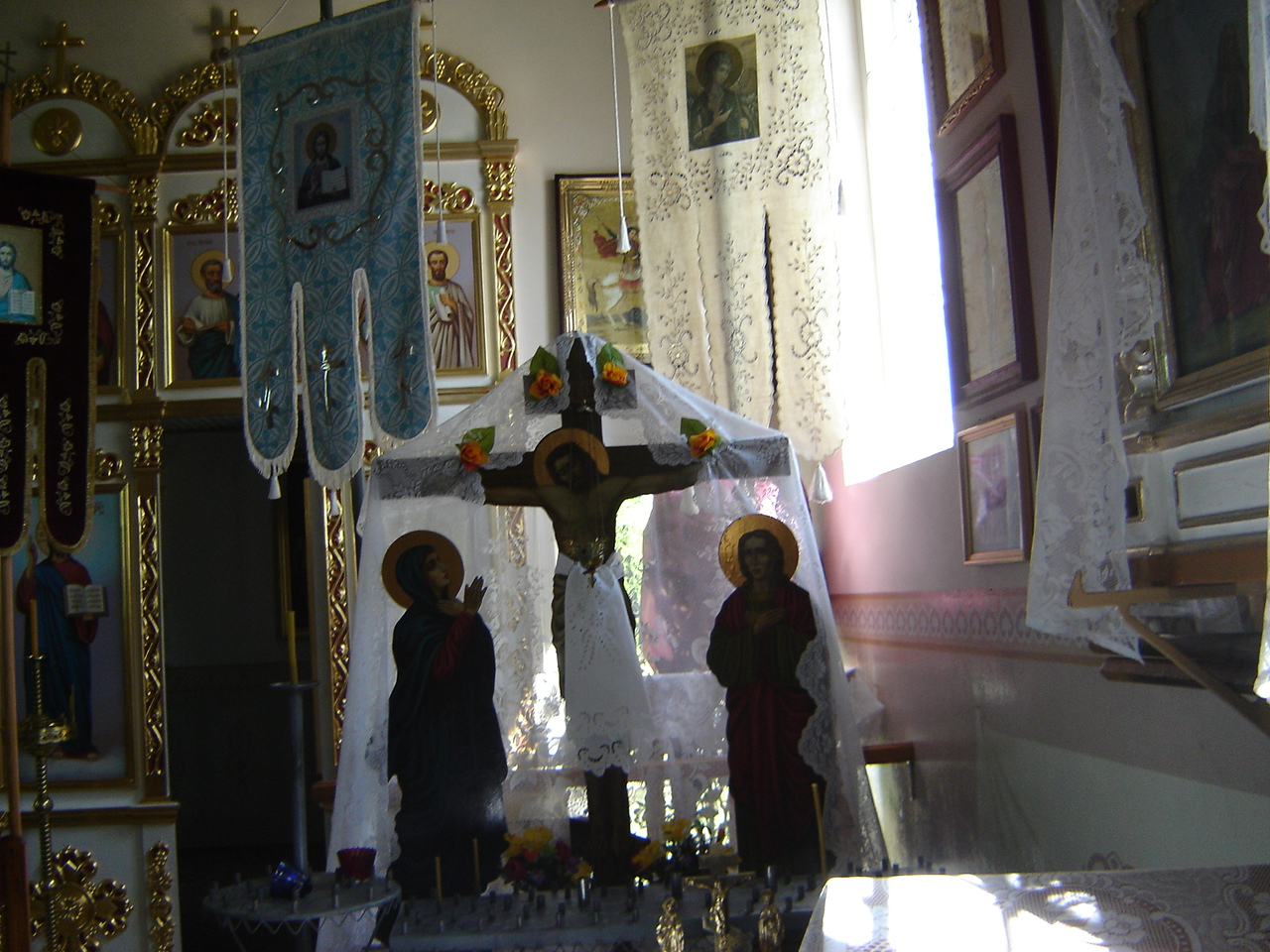 Cerkiew w Malinnikach.